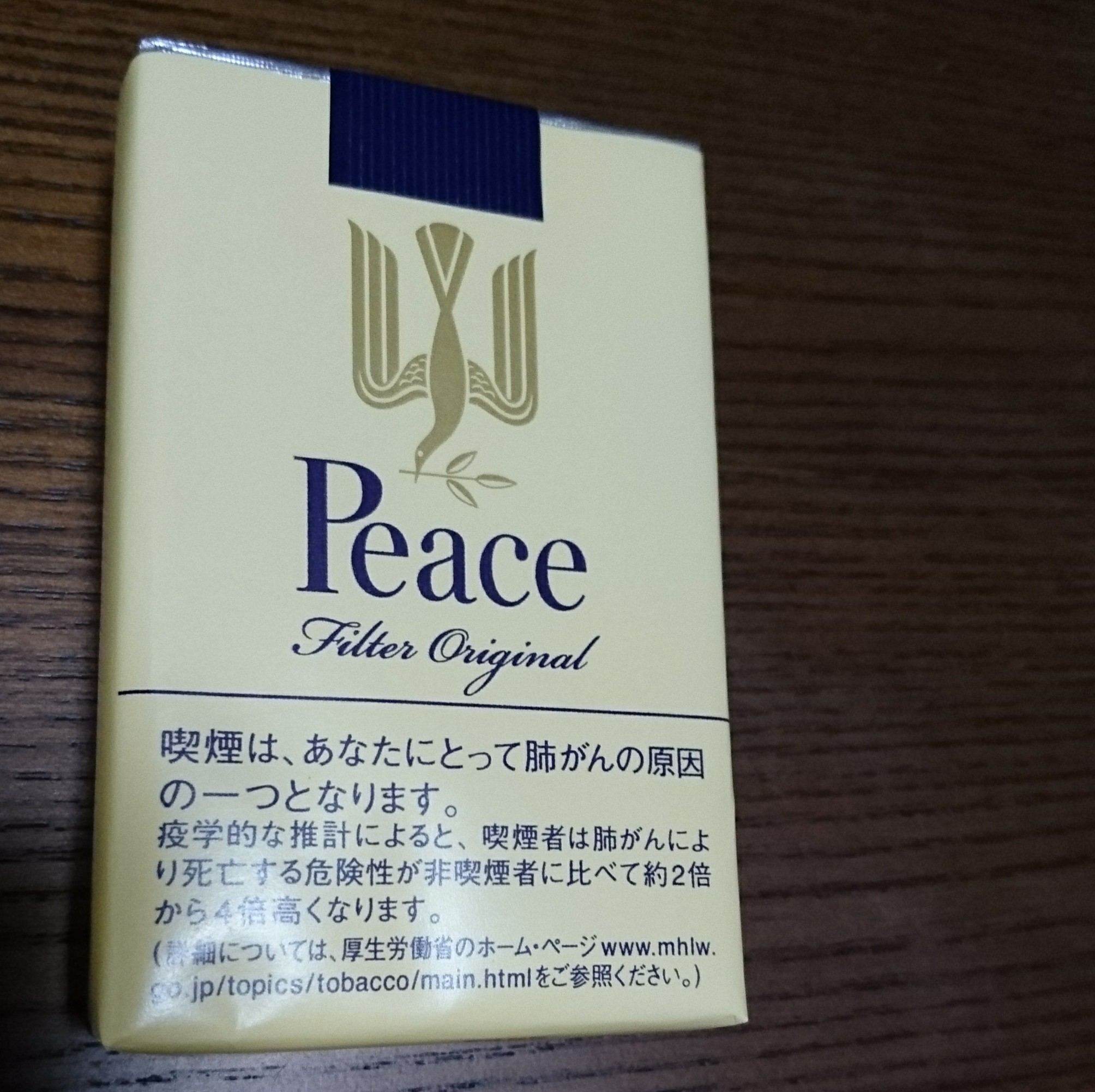 日本たばこ産業